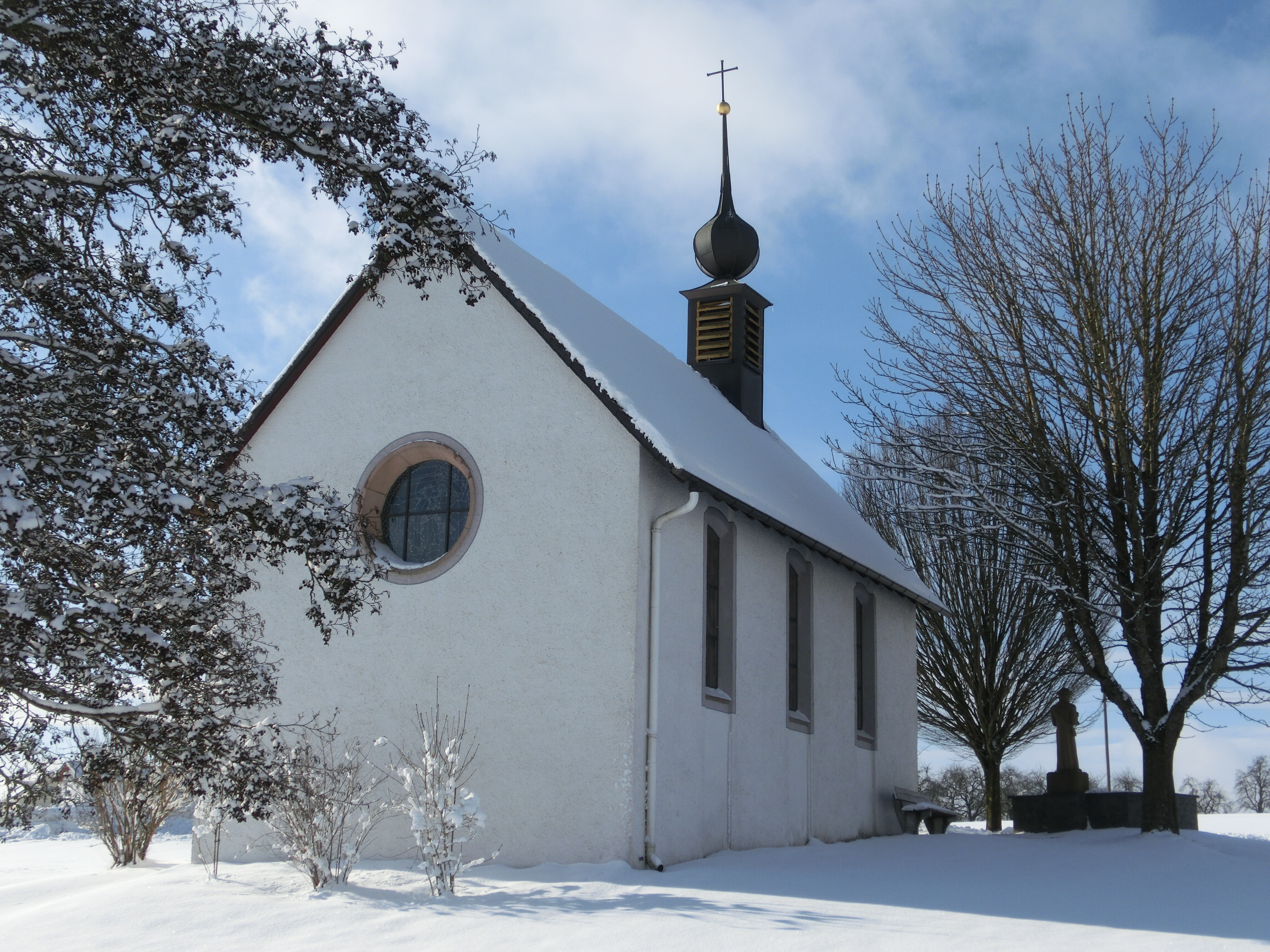 Deutschland - Baden-Württemberg - Landkreis Konstanz - Mühlingen, Ortsteil Hecheln: St. Wendelin-Kapelle